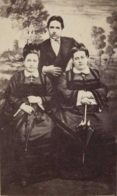 María Eugènia, María Cristina i Manuel María de Llanzas i Pignatelli